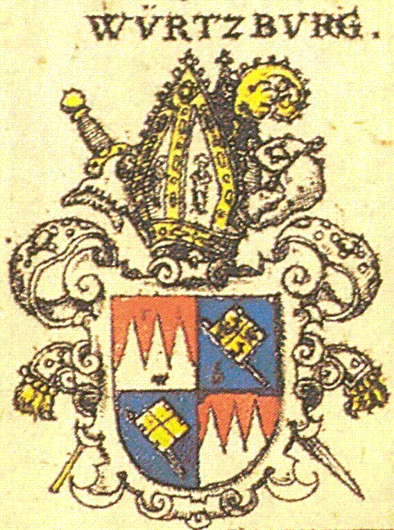 Wappen des Bistums Würzburg nach Siebmachers Wappenbuch